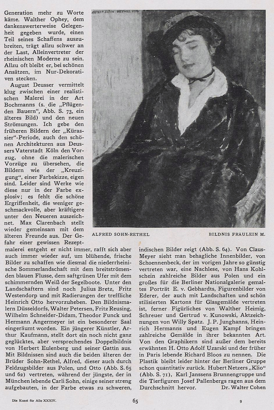 Alfred Sohn-Rethel, Bildnis Fräulein M.; Die Düsseldorfer Malerei auf der großen Kunstausstellung 1918 zu Düsseldorf; Die Kunst für Alle, vierunddreißigster Jahrgang, Heft 3/4, November 1918, Seite 65